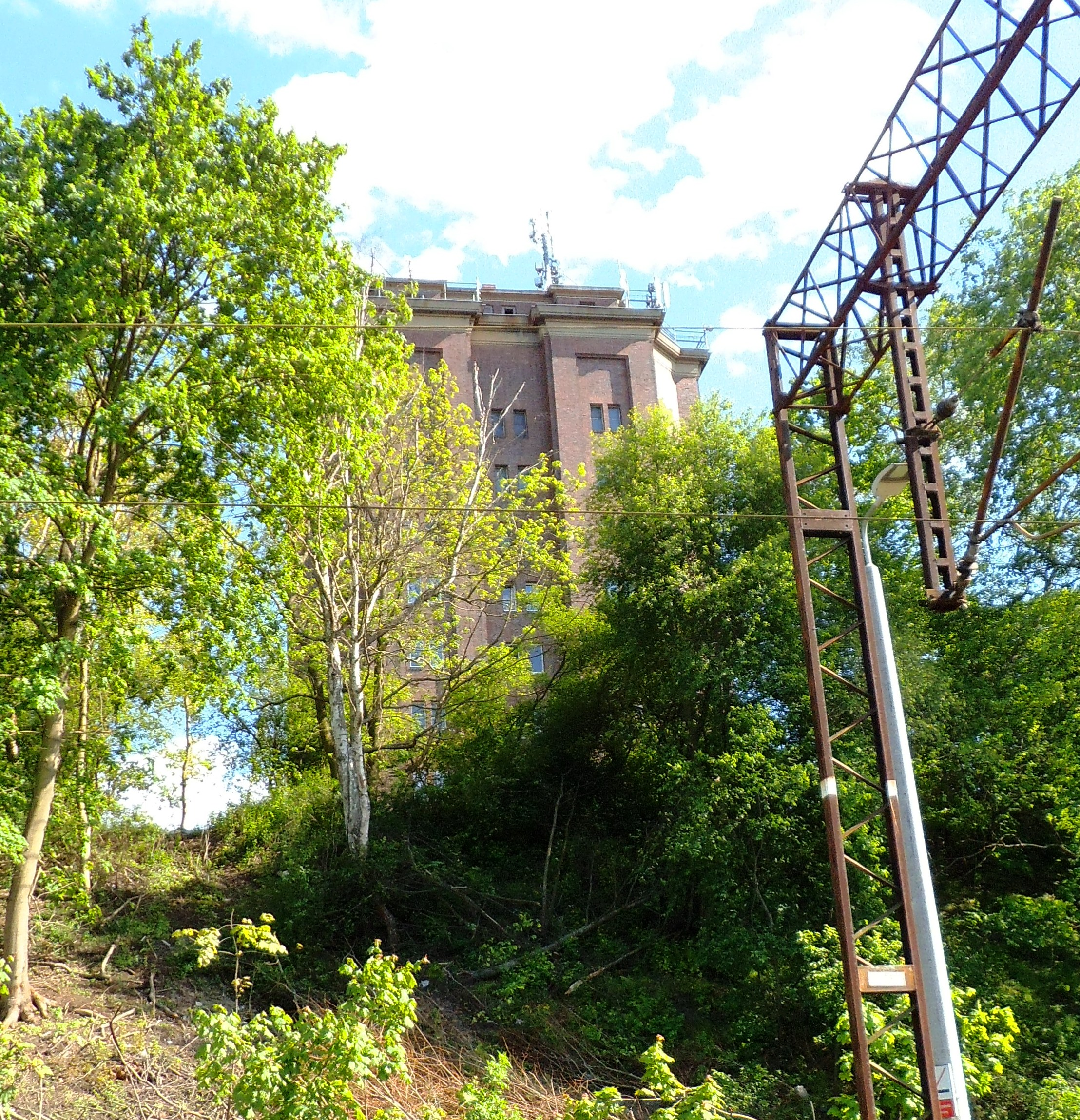 Kolejowa wieża ciśnień w Toruniu